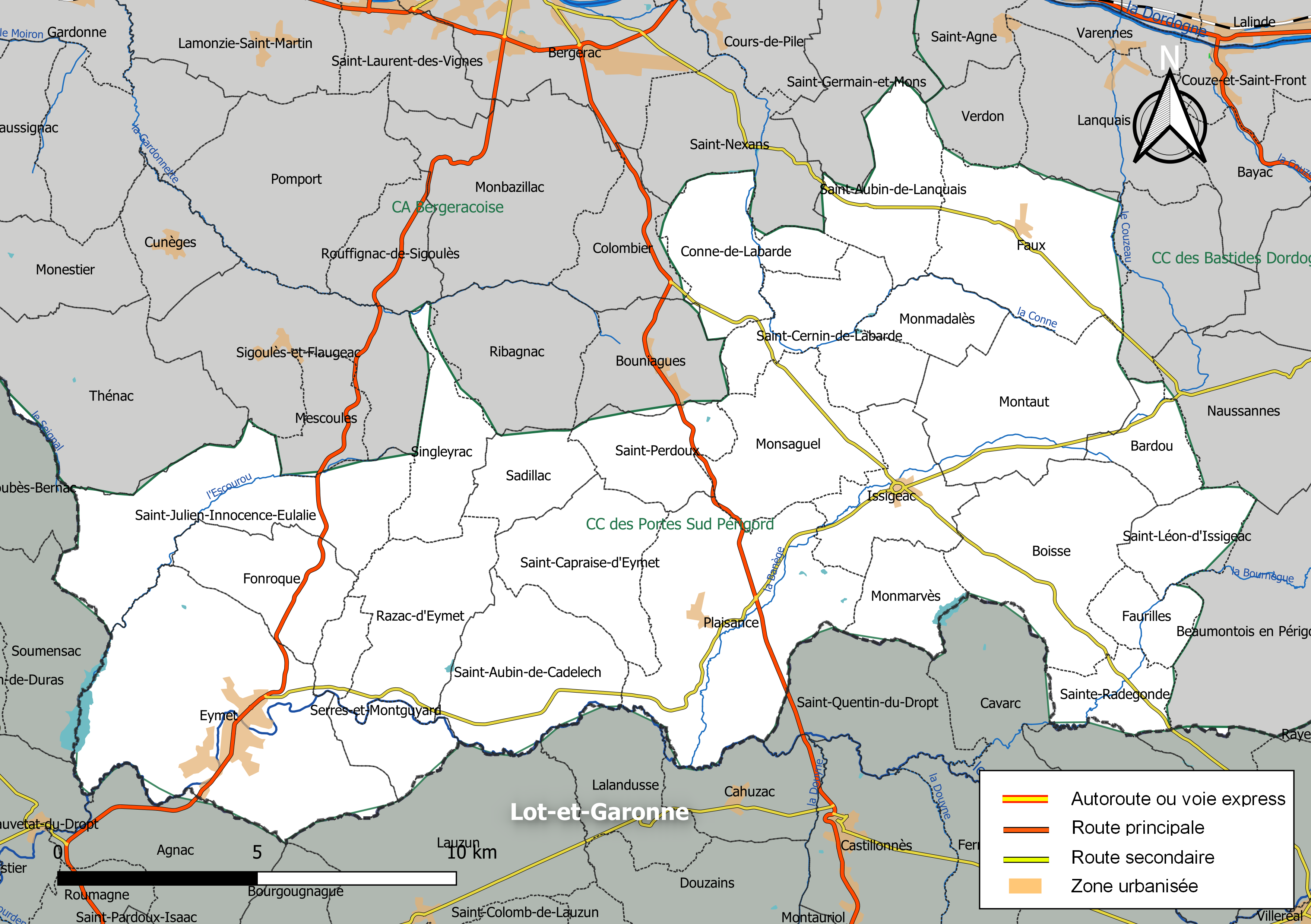 Carte géographique de la Communauté de communes des Portes Sud Périgord , département de la Dordogne, France. Composition au 1er janvier 2019.